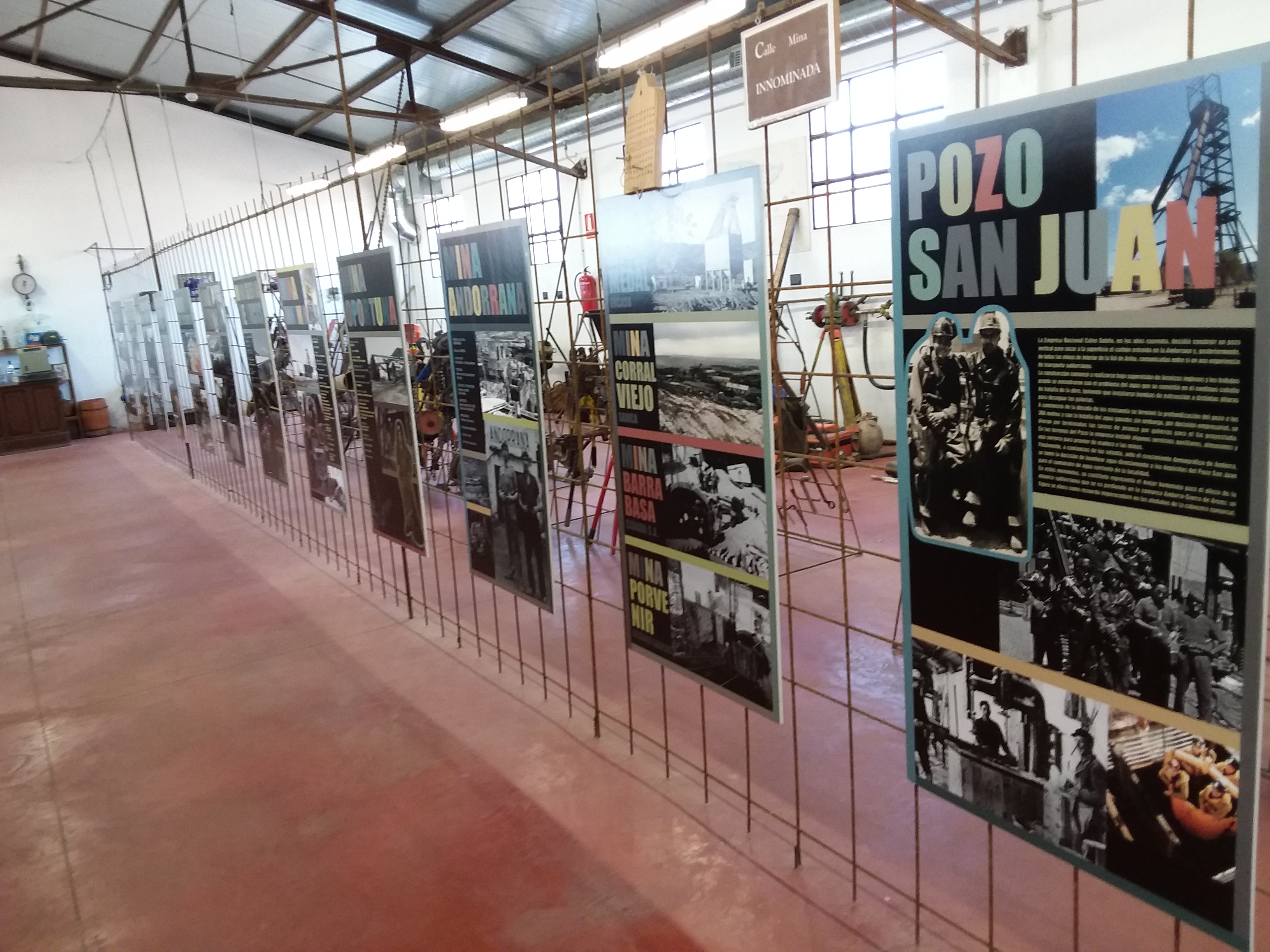 Museo MWINAS imágenes del interior.